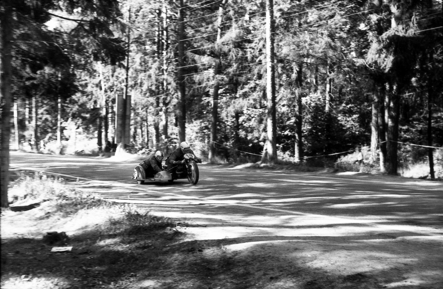 Heik Reitel-Argo Pappel NLKP meistrivõistluste IV Tallinnas 21. ja 22. augustil 1971. a.